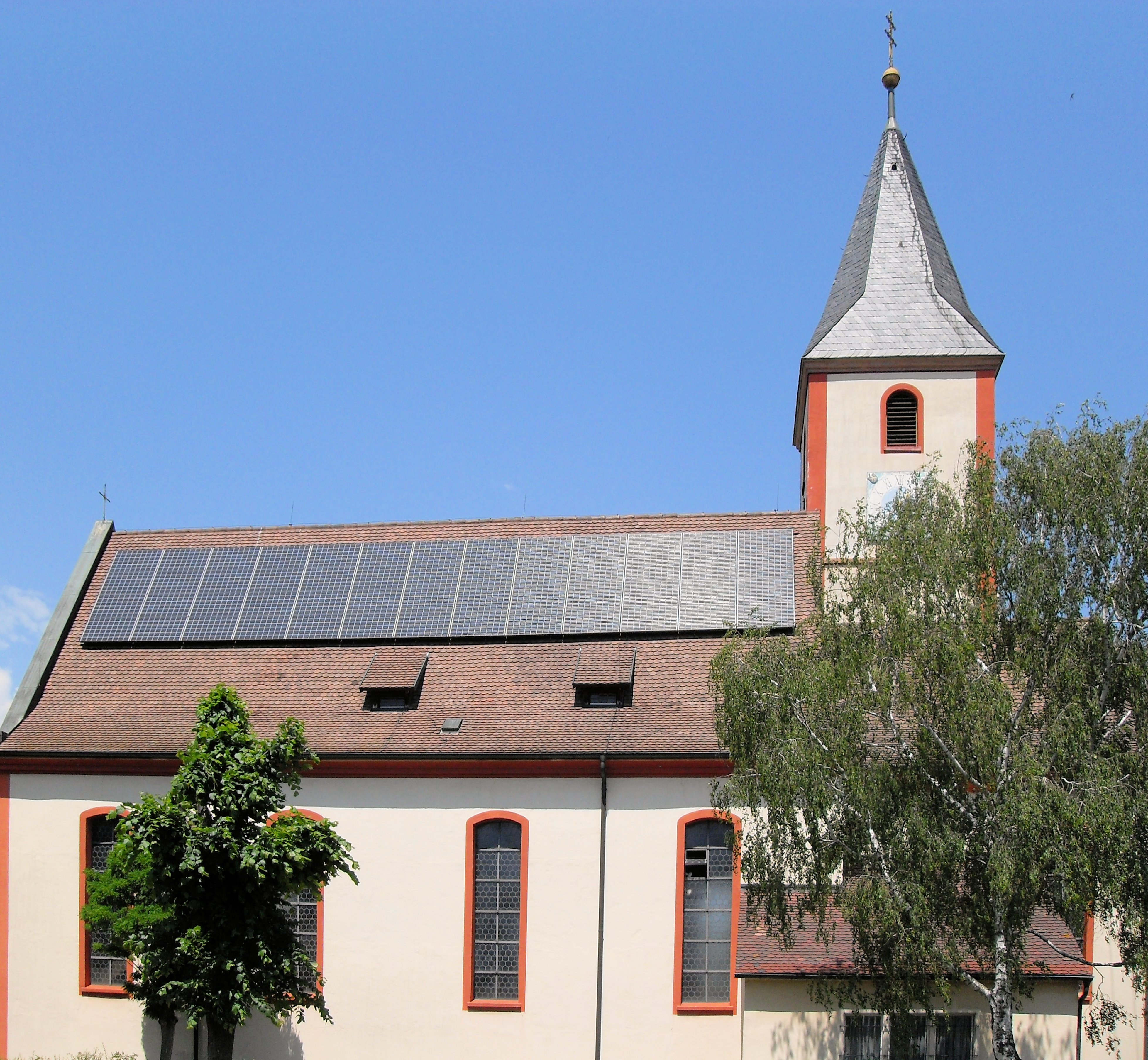 Kirche St. Martin in Saasbach am Kaiserstuhl